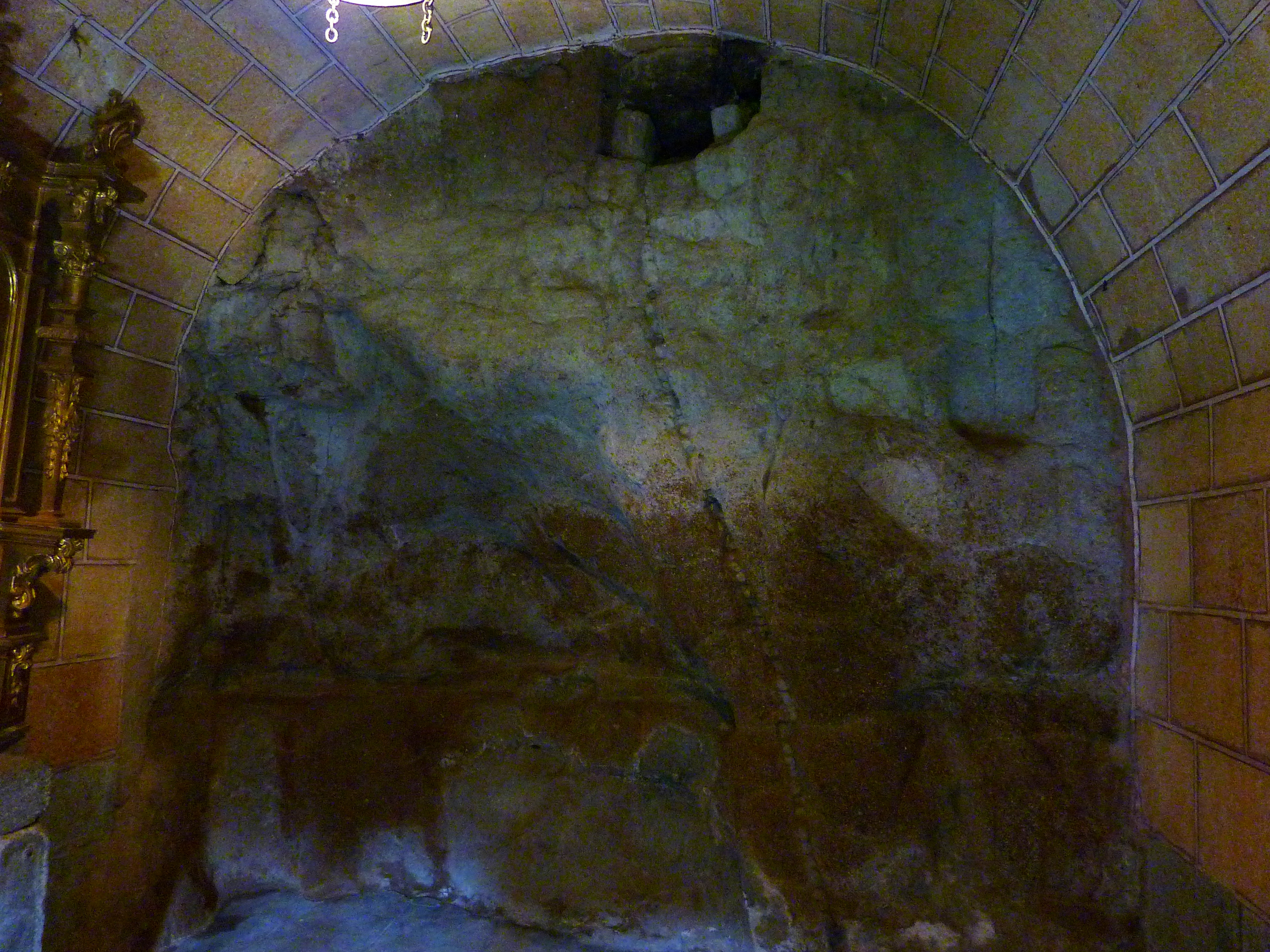 Roca en la cripta de la basílica de San Vicente (Ávila).